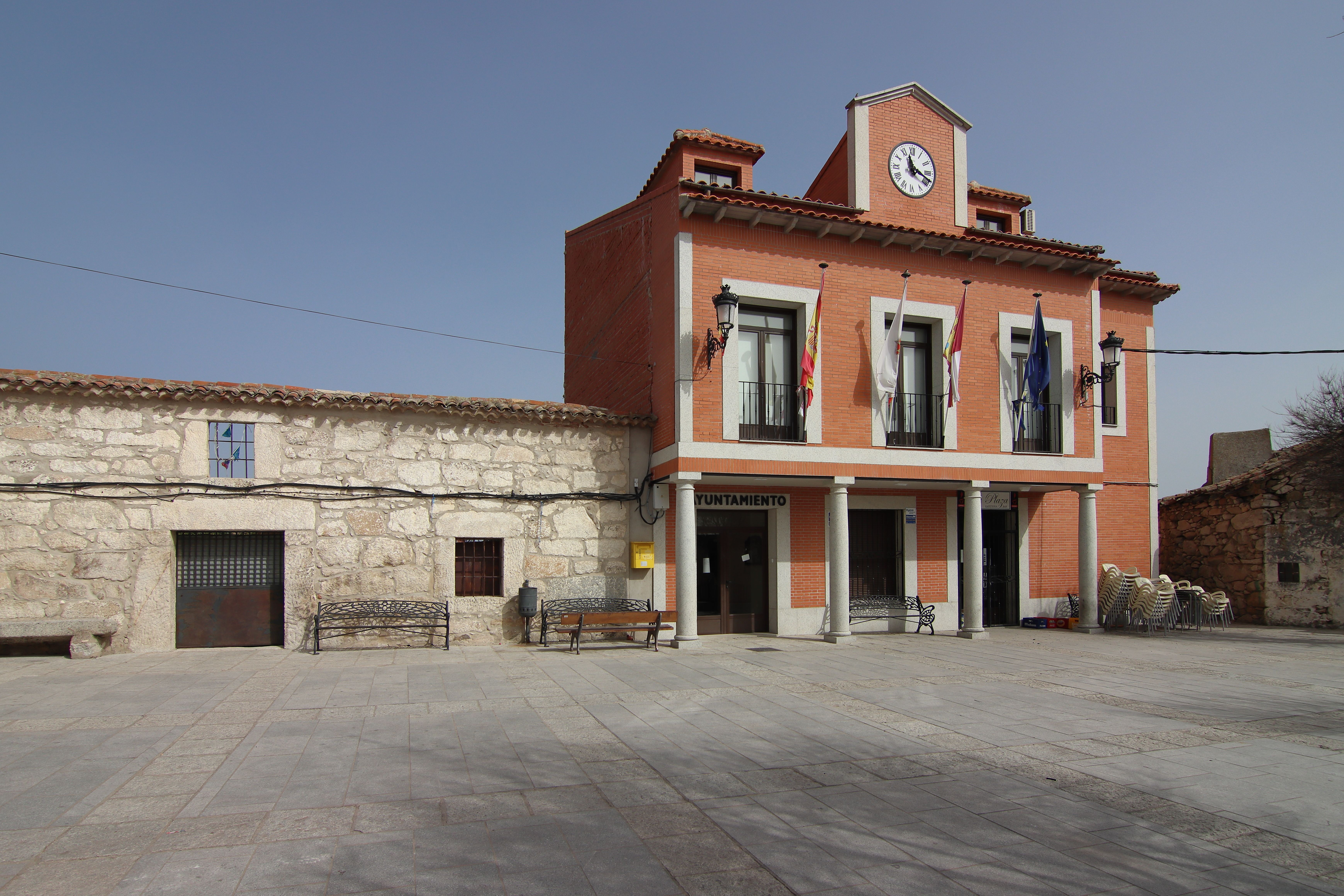 Ayuntamiento de Aldea en Cabo, 02